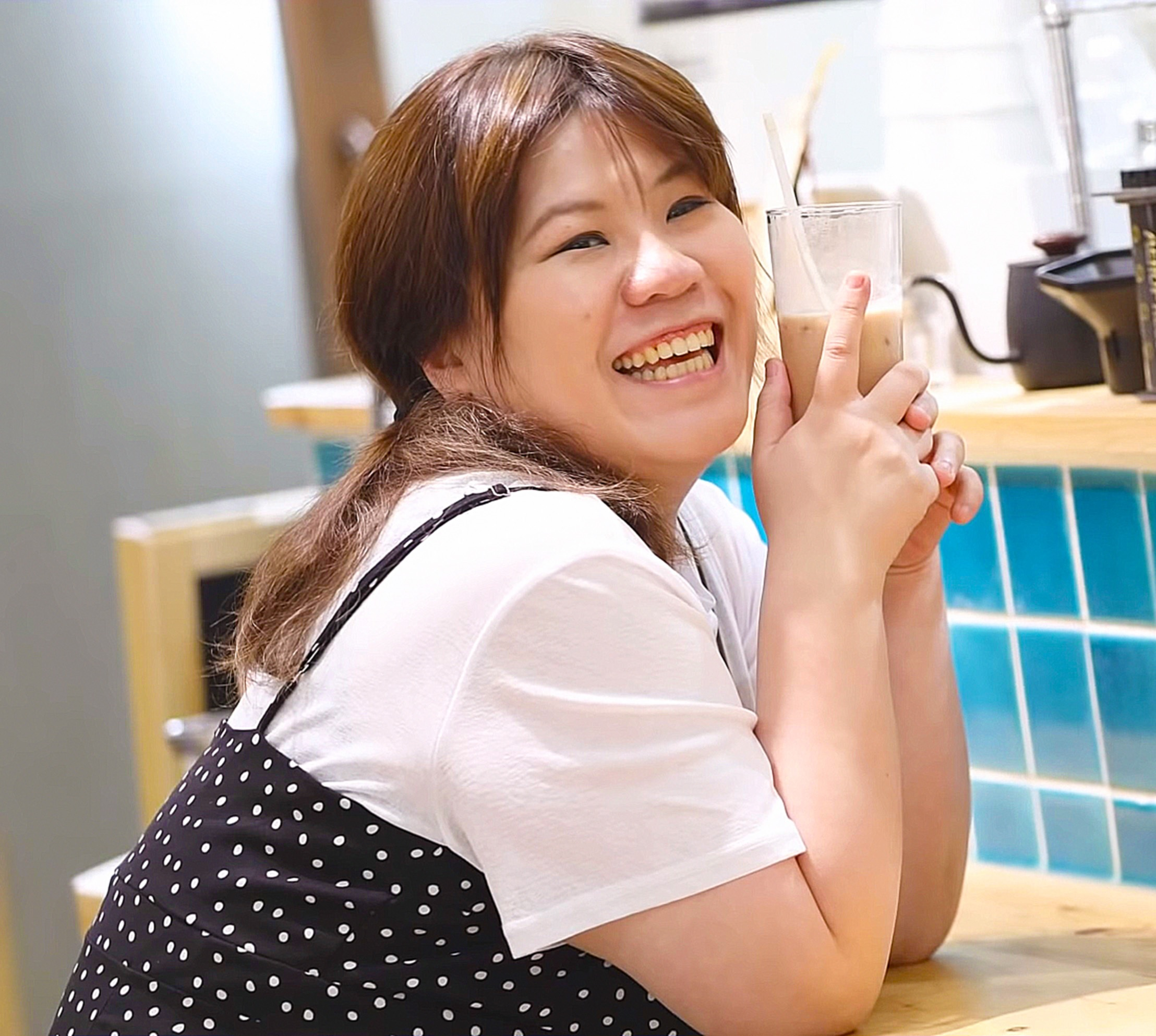 中文（香港）: 曾於2005年參加無綫電視綜藝節目《殘酷一叮》，2017年因在《愛·回家之開心速遞》中飾演「池美麗」一角而逐漸受到關注。